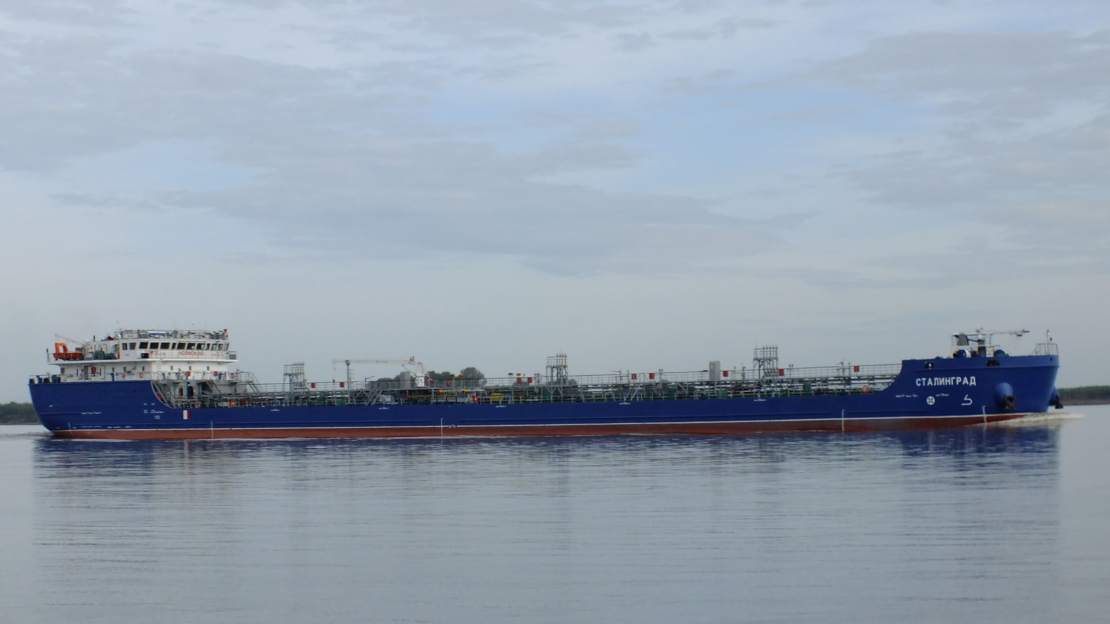 Танкер СТАЛИНГРАД на Амуре